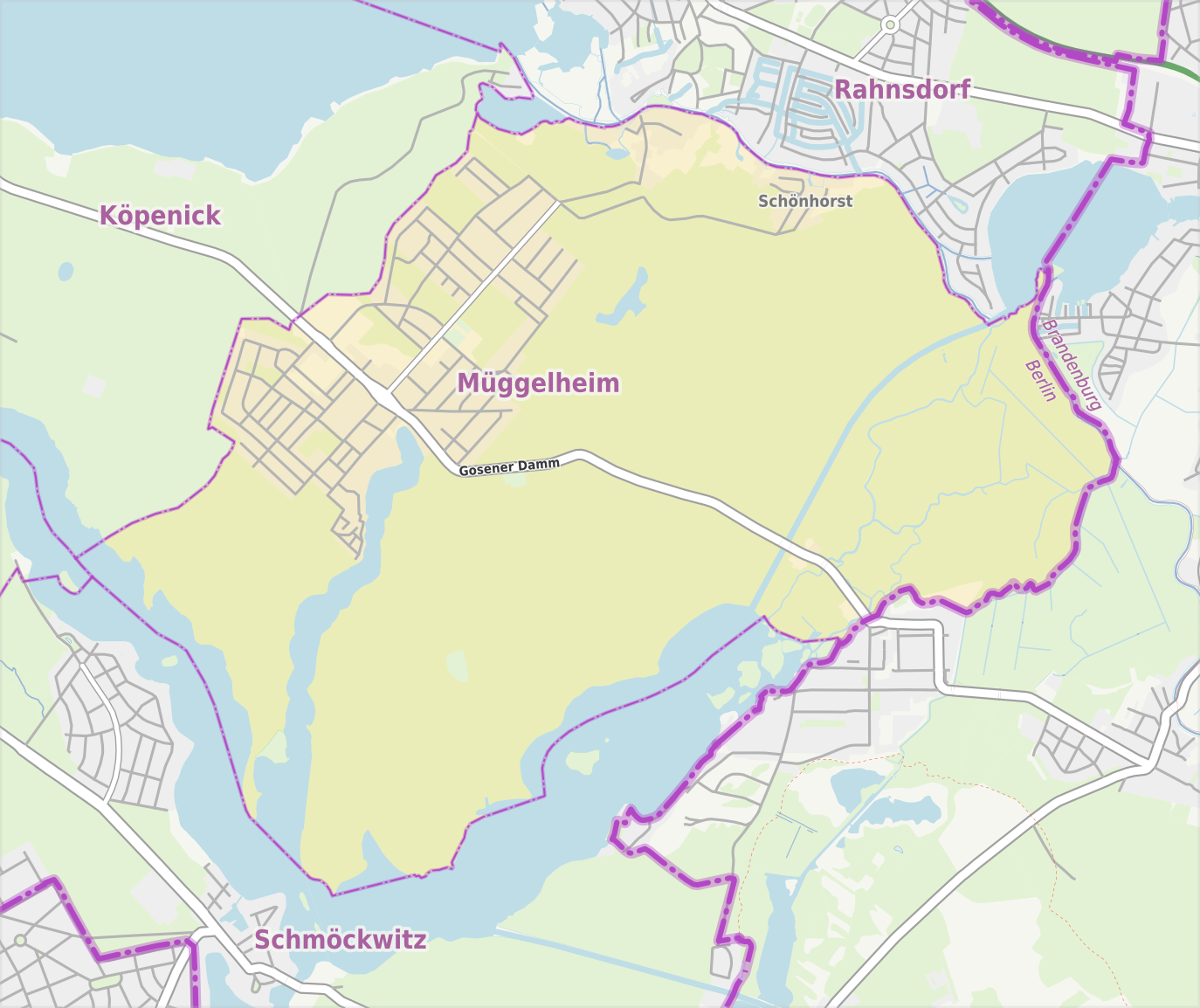 Übersichtskarte der Straßen und Ortslagen in Berlin-Müggelheim